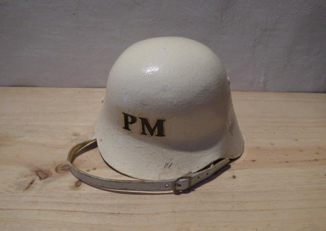 Casco Z42 de la Policía Militar